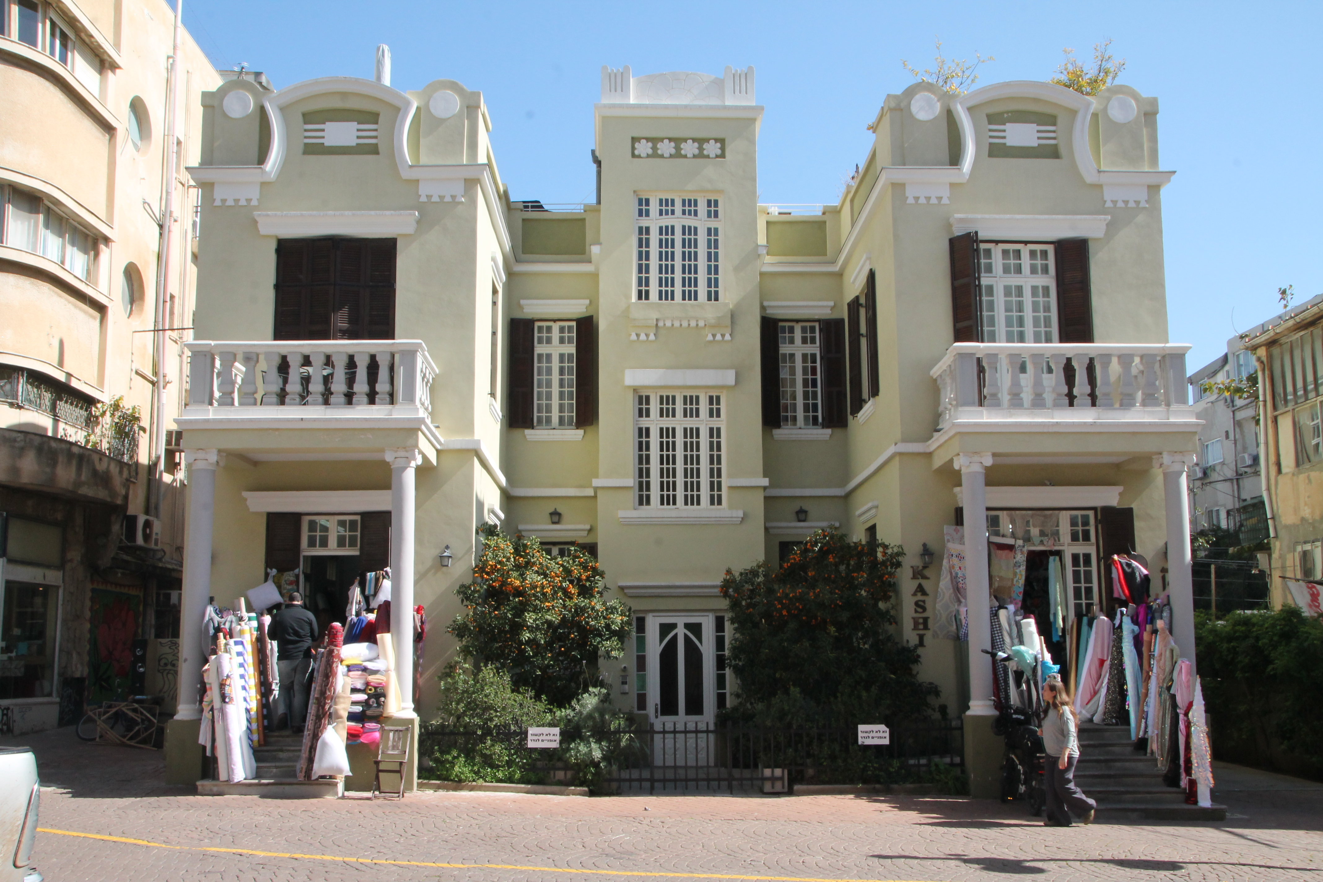 בית סקופסקי ברחוב נחלת בנימין 5 ת"א